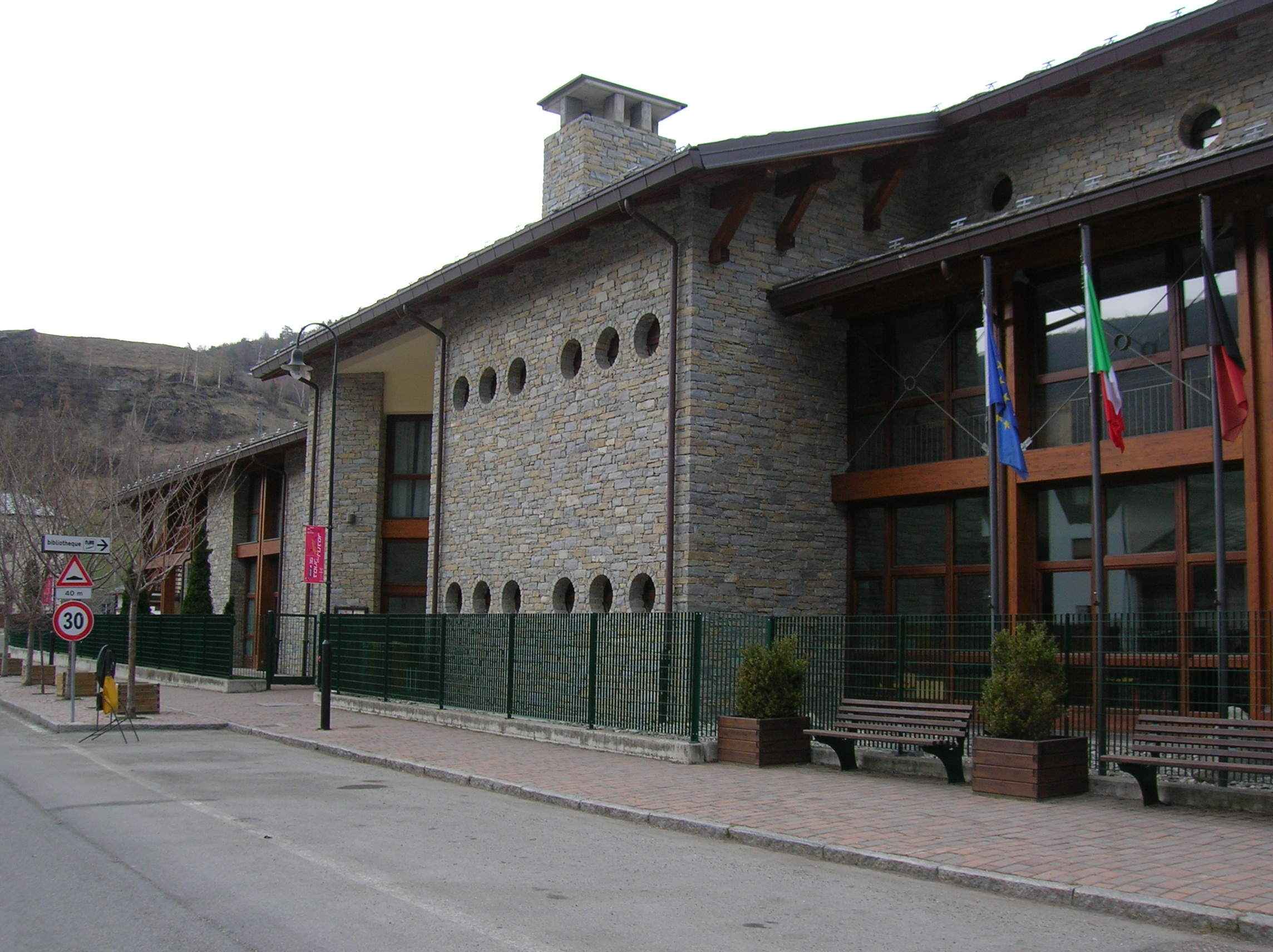 Biblioteca di Arvier, Valle d'Aosta, Italia.